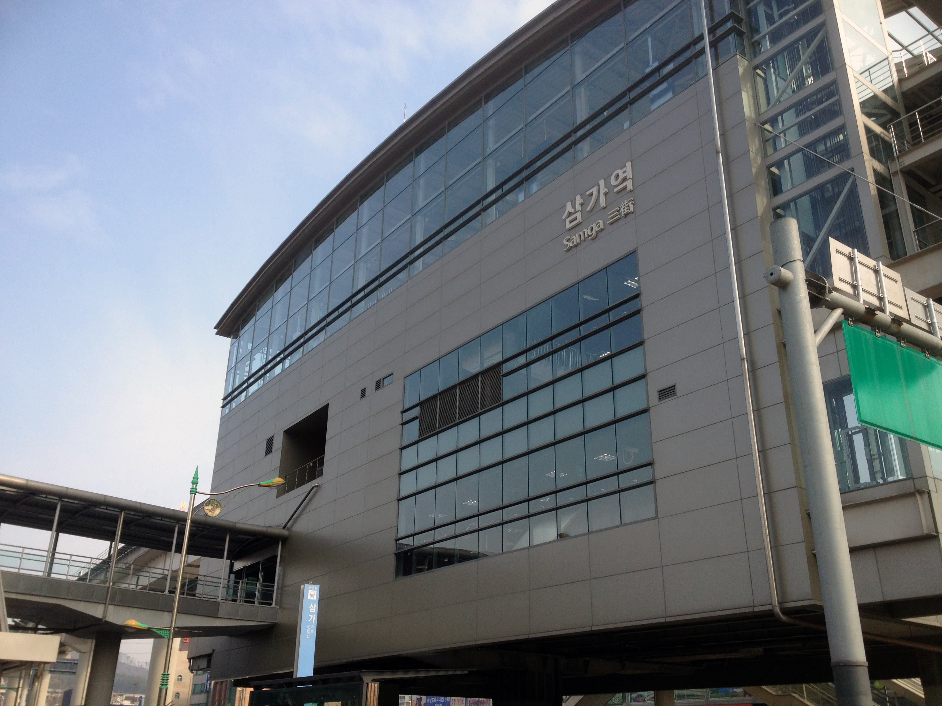 삼가역 역사